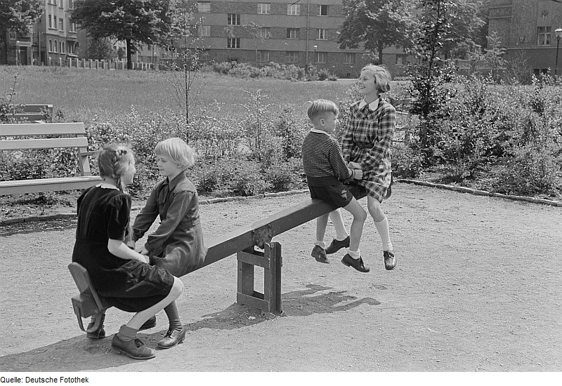 Original image description from the Deutsche Fotothek Kinder auf einem Spielplatz